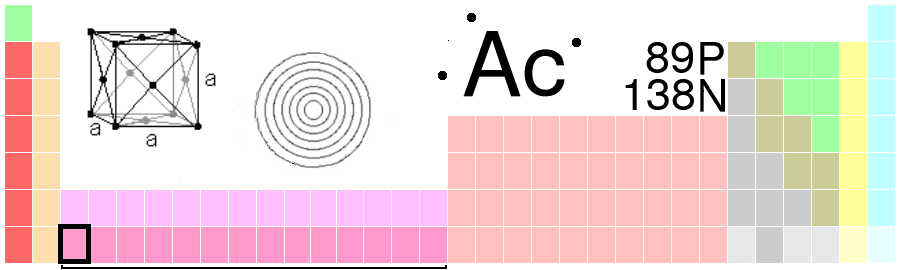 Periodic Table - Actinium